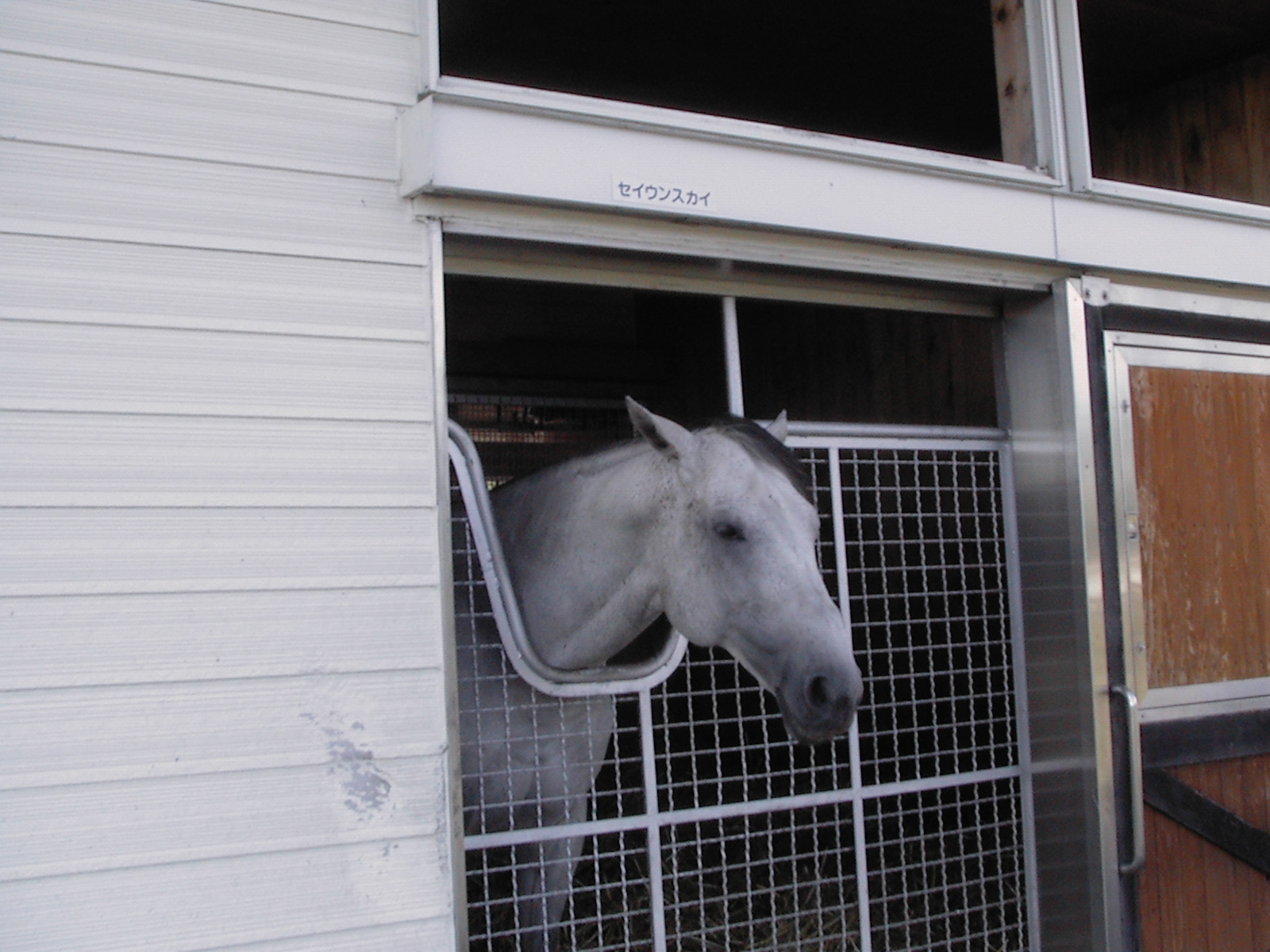 アロースタッドの牧場見学時に撮影。